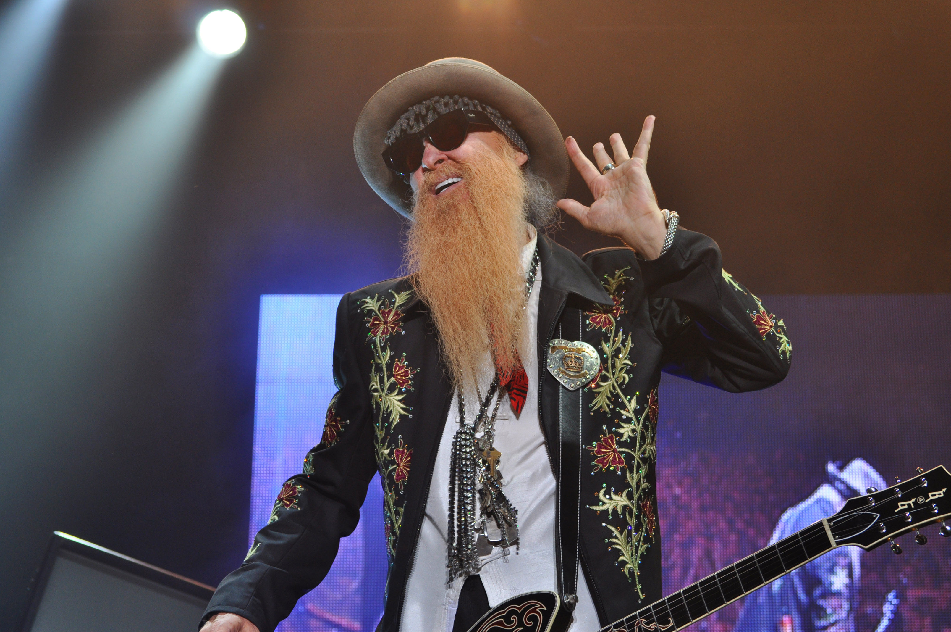 Billy Gibbons à Tours en 2011.